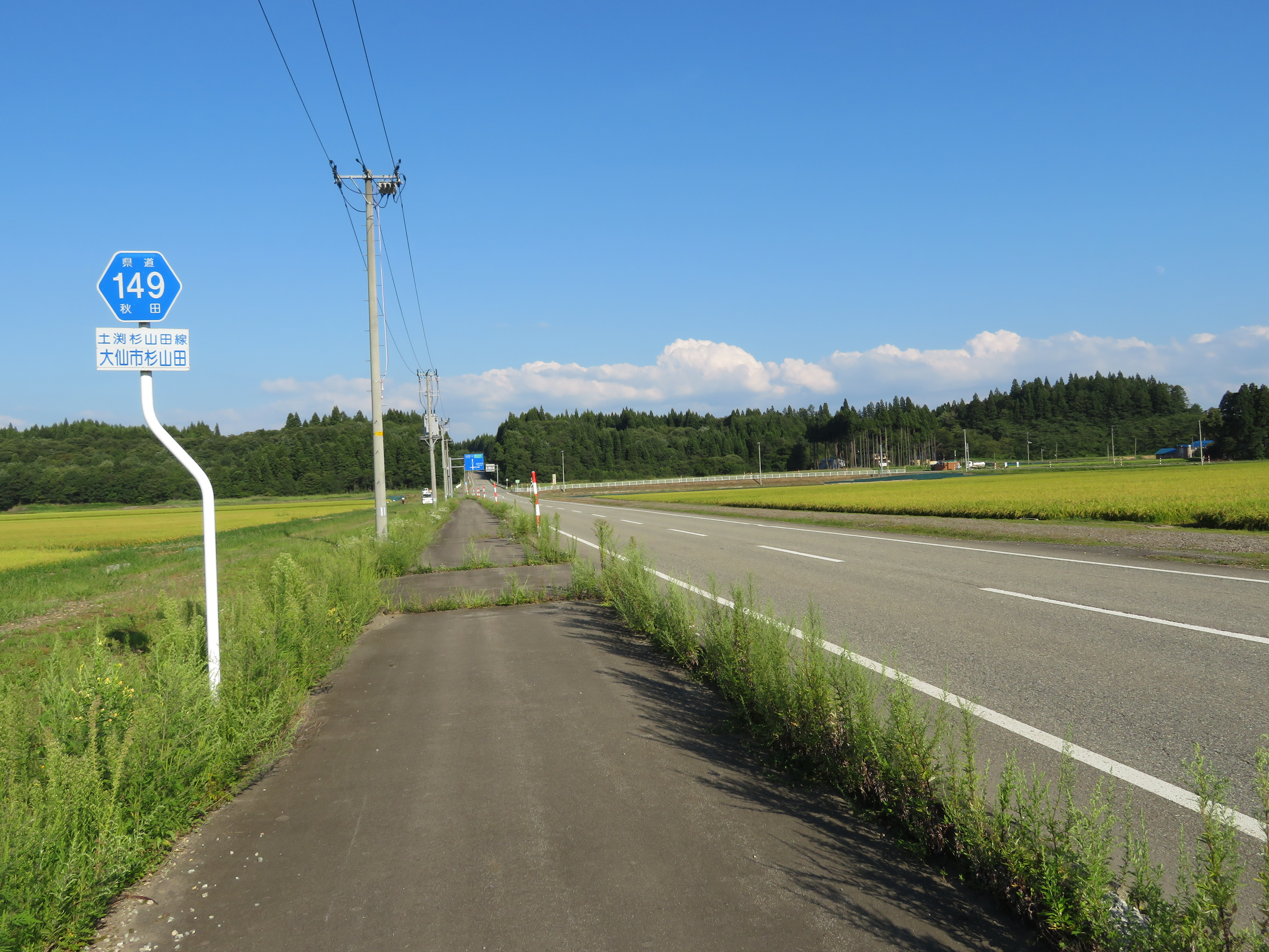 秋田県道149号土淵杉山田線 大仙市杉山田付近（大曲方面を撮影） Canon PowerShot SX720 HS